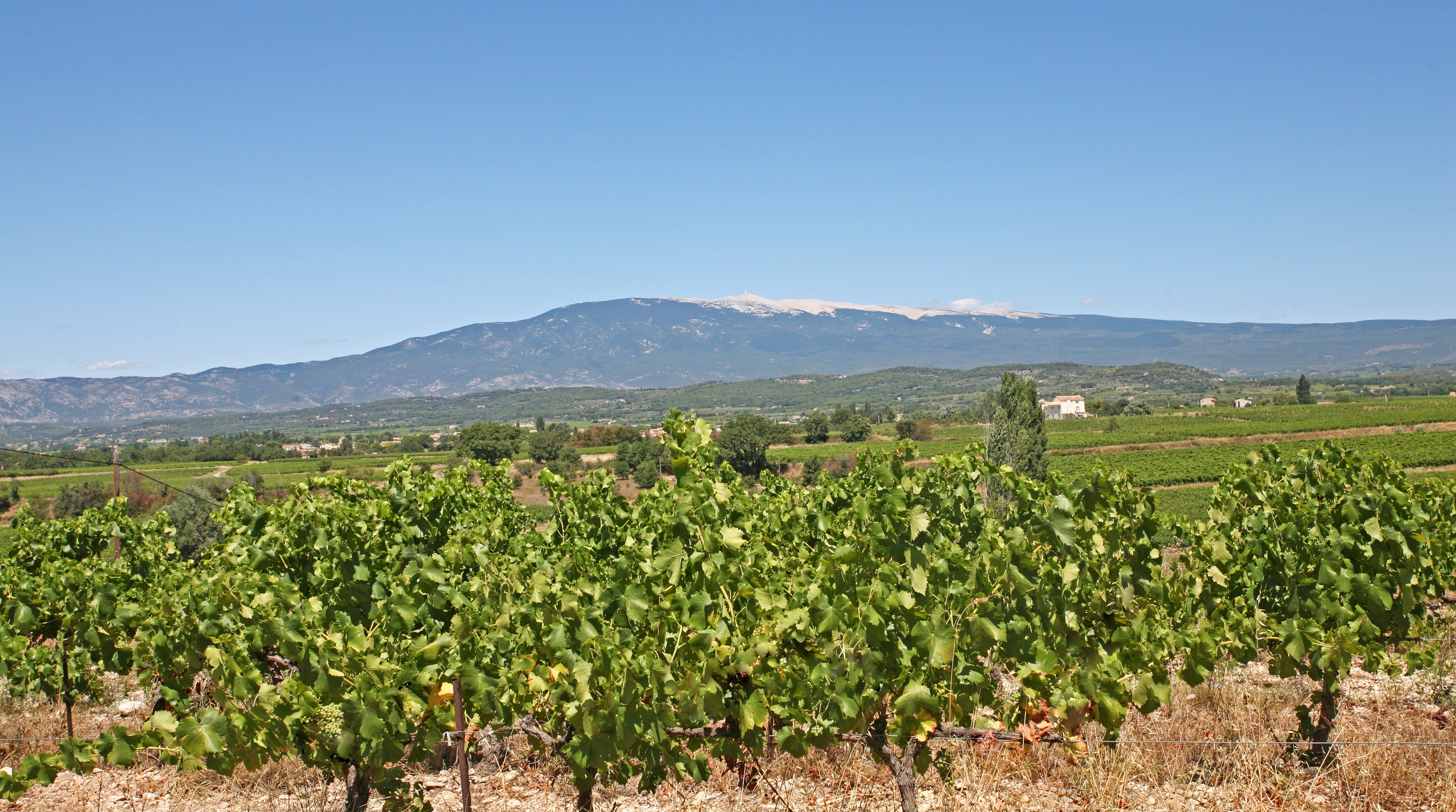 Le mont Ventoux (vu depuis le sud) par dessus les vignes de la plaine de la commune de Mazan (France), entre Mazan et Saint Didier par la route départementale 1.